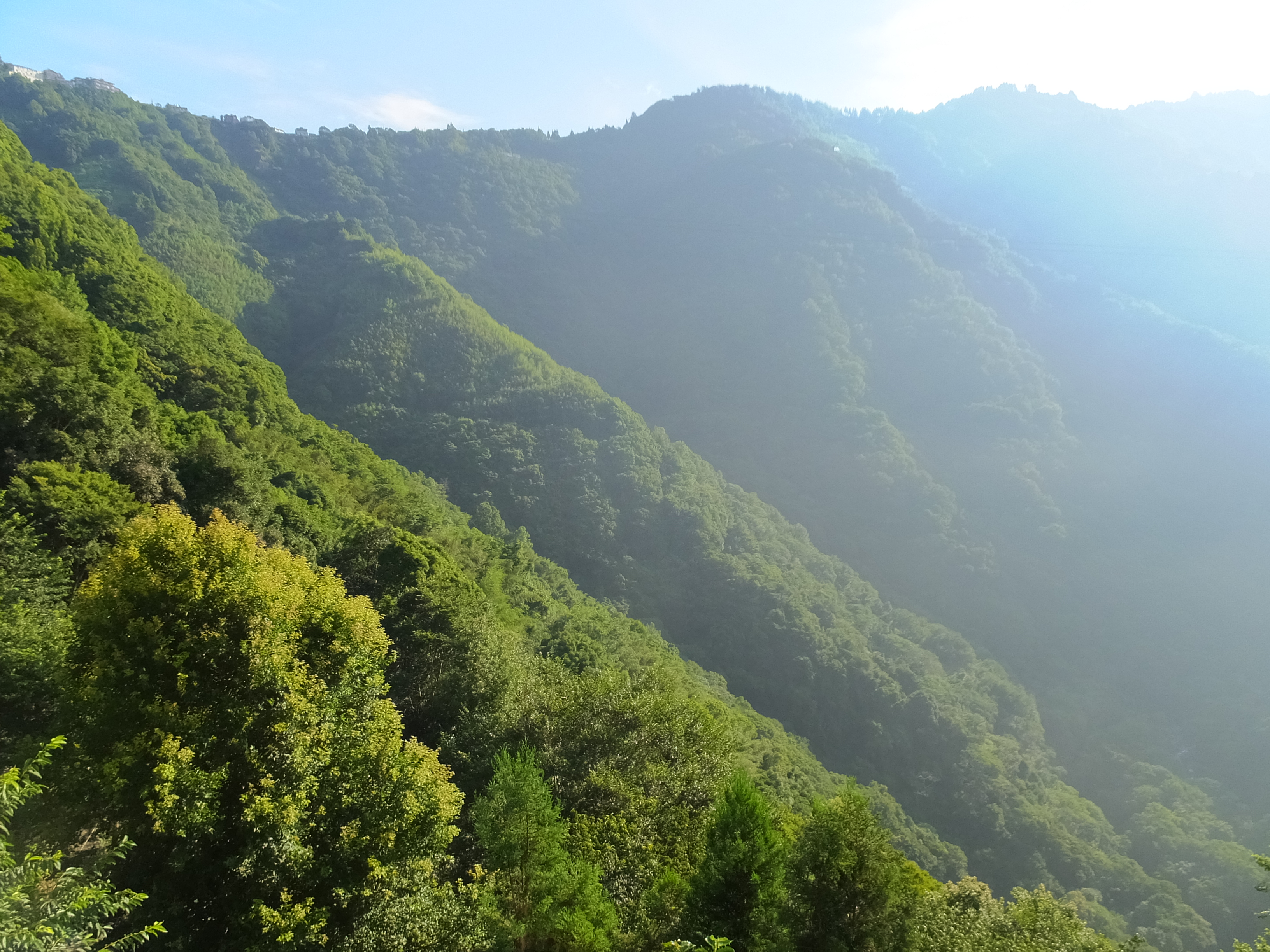 La La Mountain 拉拉山